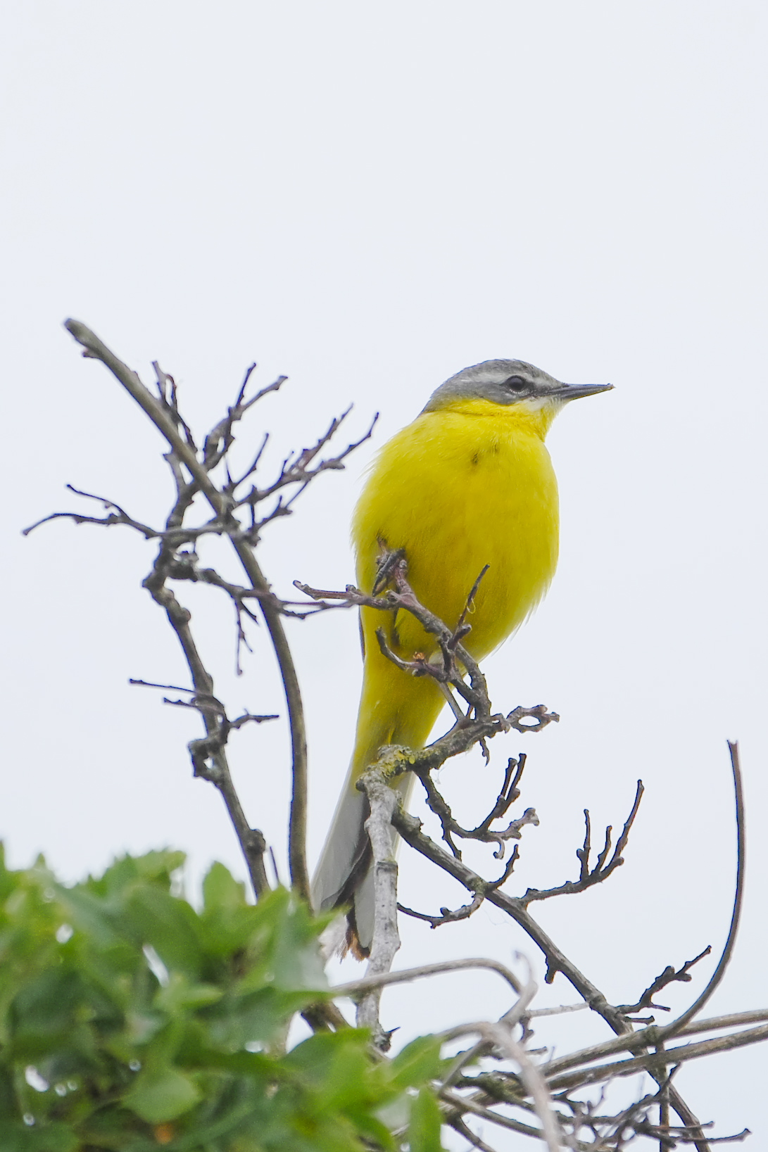 Wiesenschafstelzenmännchen Anfang Juni im Naturschutzgebiet Rangsdorfer See im Land Brandenburg, Deutschland